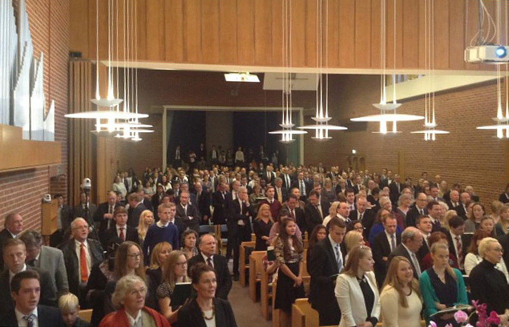 En vanlig gudstjänst i Gubbängens församling.